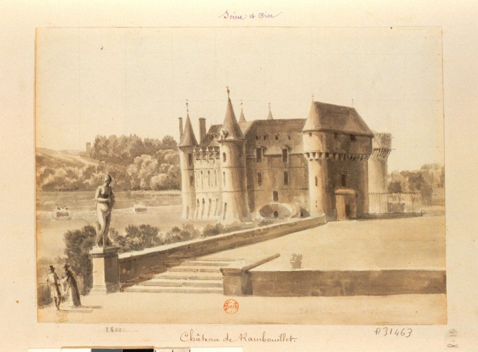 Château de Rambouillet - Dessin de Dunouy, Alexandre-Hyacinthe (1757-1841)